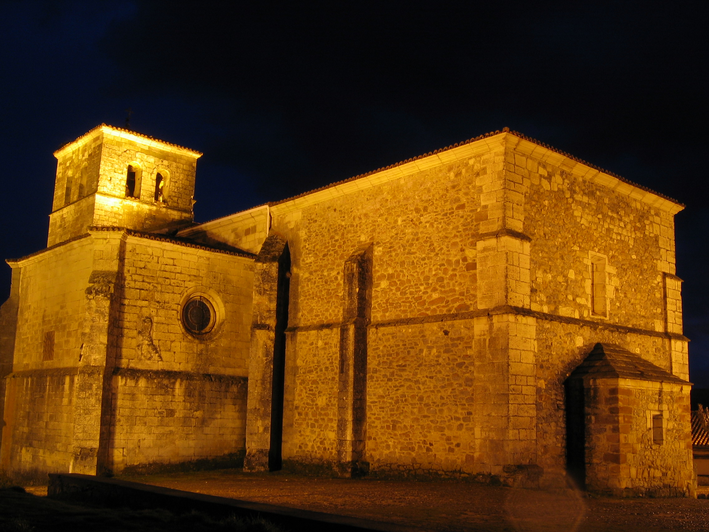 Iglesia de Santa María del Castillo. Cervera de Pisuerga (Palencia). S.XVI.